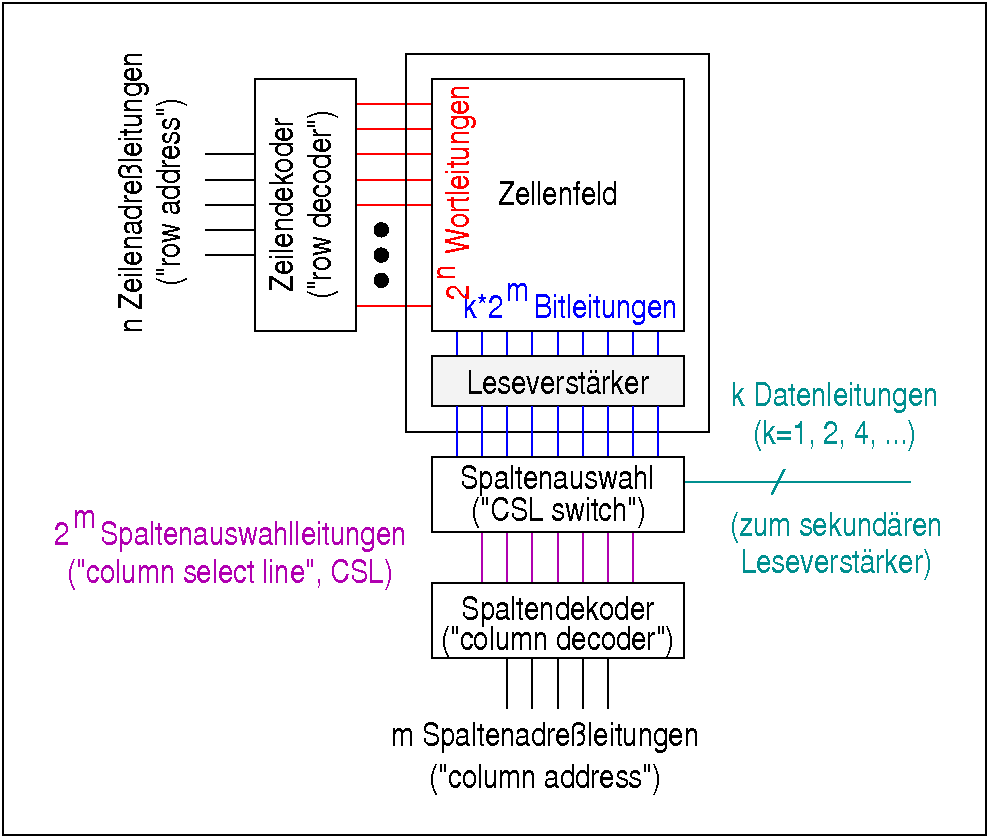 Schematischer Aufbau der Dekodierung der Zeilen- und Spaltenadresse eines DRAM-Zellenfeldes